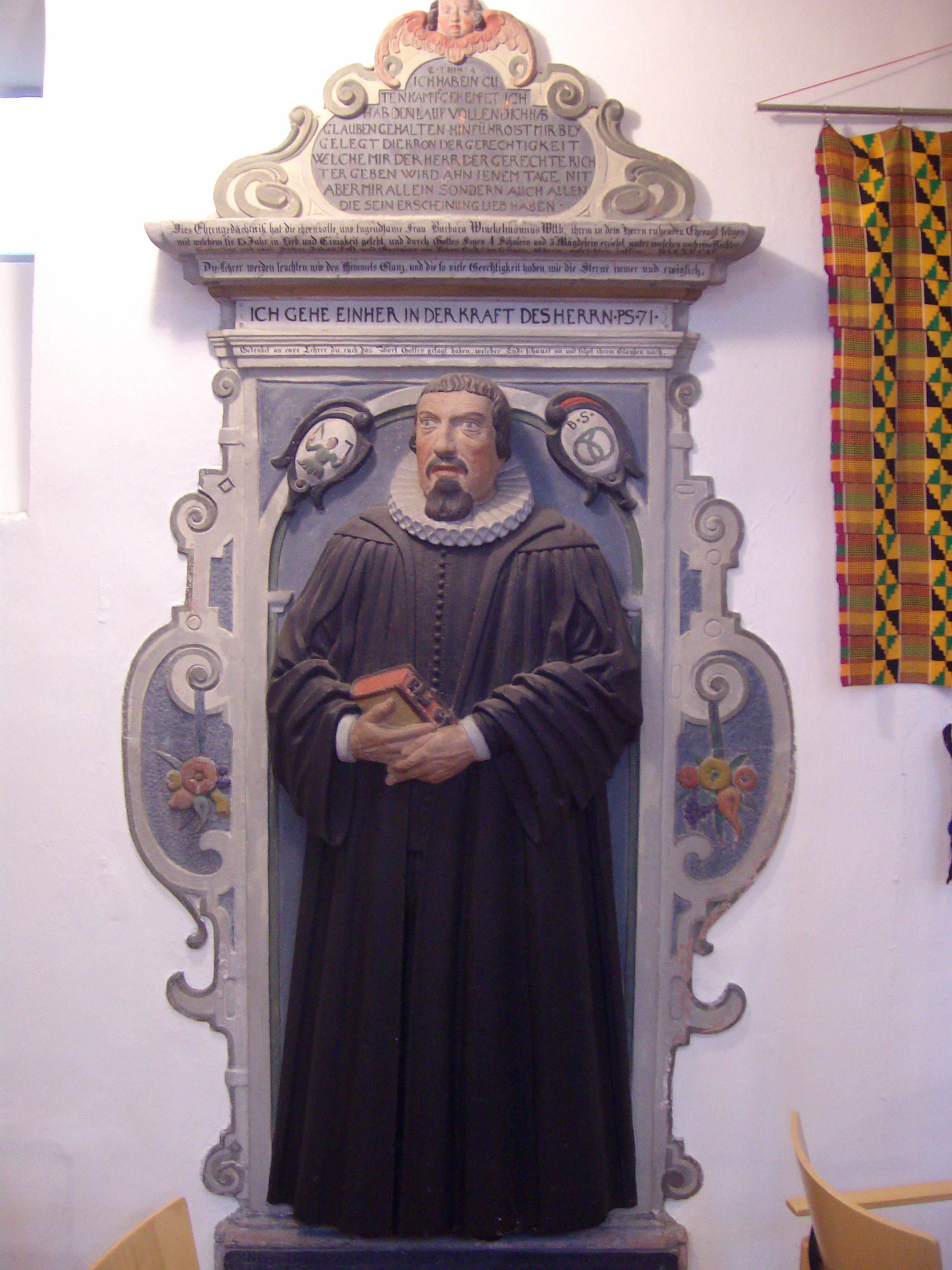 Epitaph für Johannes Winckelmann, Kapelle Alter Friedhof, Gießen, Hessen, Deutschland